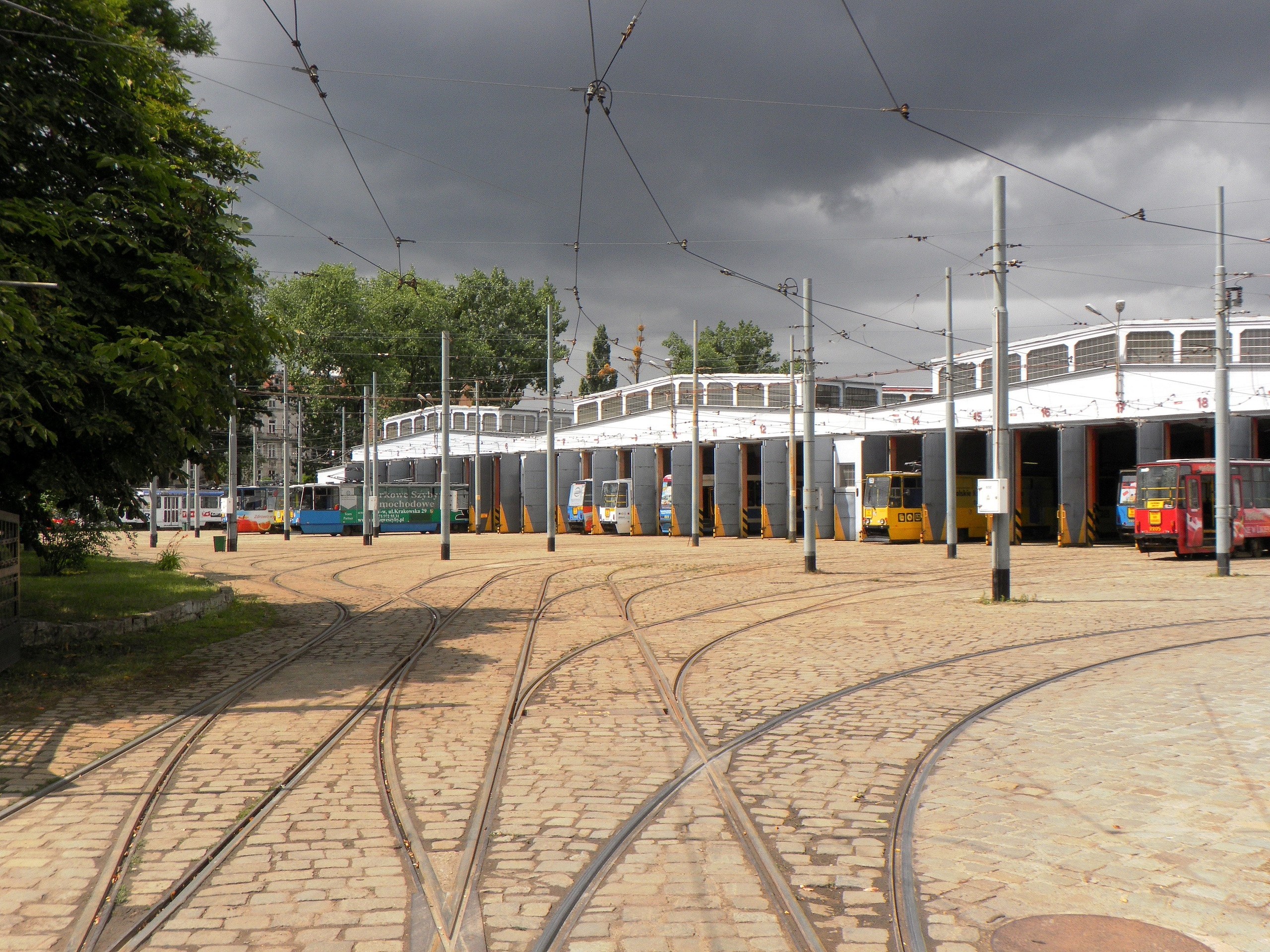 Zajezdnia nr II Ołbin przy ulicy Słowiańskiej.